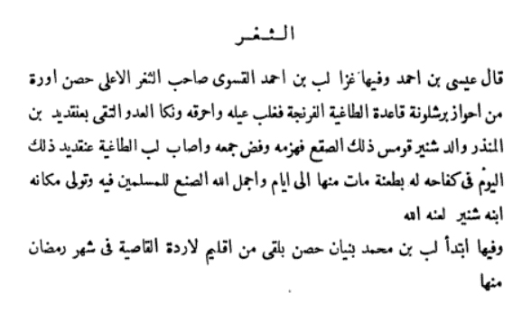 Mort de Guifré el Pilós narrada per l'historiador andalusí Abu Marwán Hayyán Ibn Jalaf Ibn Hayyan (987-1075) en la seva obra Al-Muqtabis fi Tarikh al-Andalus, vol.3. Ha estat publicada entre d'altres per Melchor Martínez Antuña a Chronique du règne du calife umaiyade Abd Allah (888-912) publicada a París el 1937, o Cronica del Califa Abdarrahman III an-Nasir entre los años 912-942, de María Jesús Viguera i Federico Corriente, publicada a Saragossa el 1981